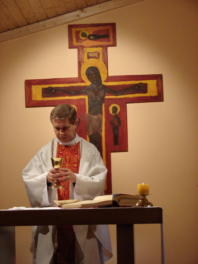 Kapłan katolicki sprawujący Mszę świętą